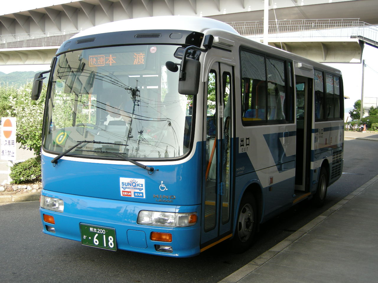 Kyusyu Sangyo Kotsu,Rapid bus"Ushio"